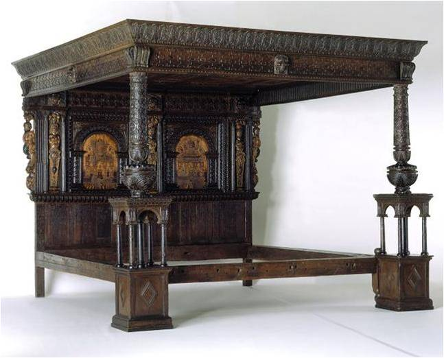 Llit